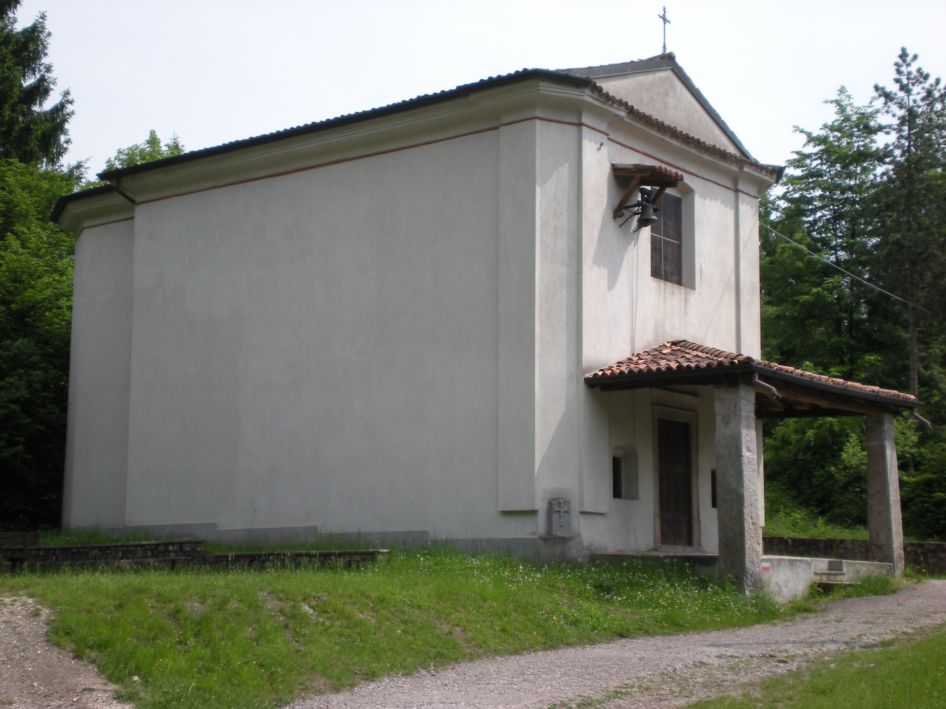 Oratorio di San Bernardo a Pertica Alta, lungo il sentiero Emiliano Rinaldini e Mario Pellizzari